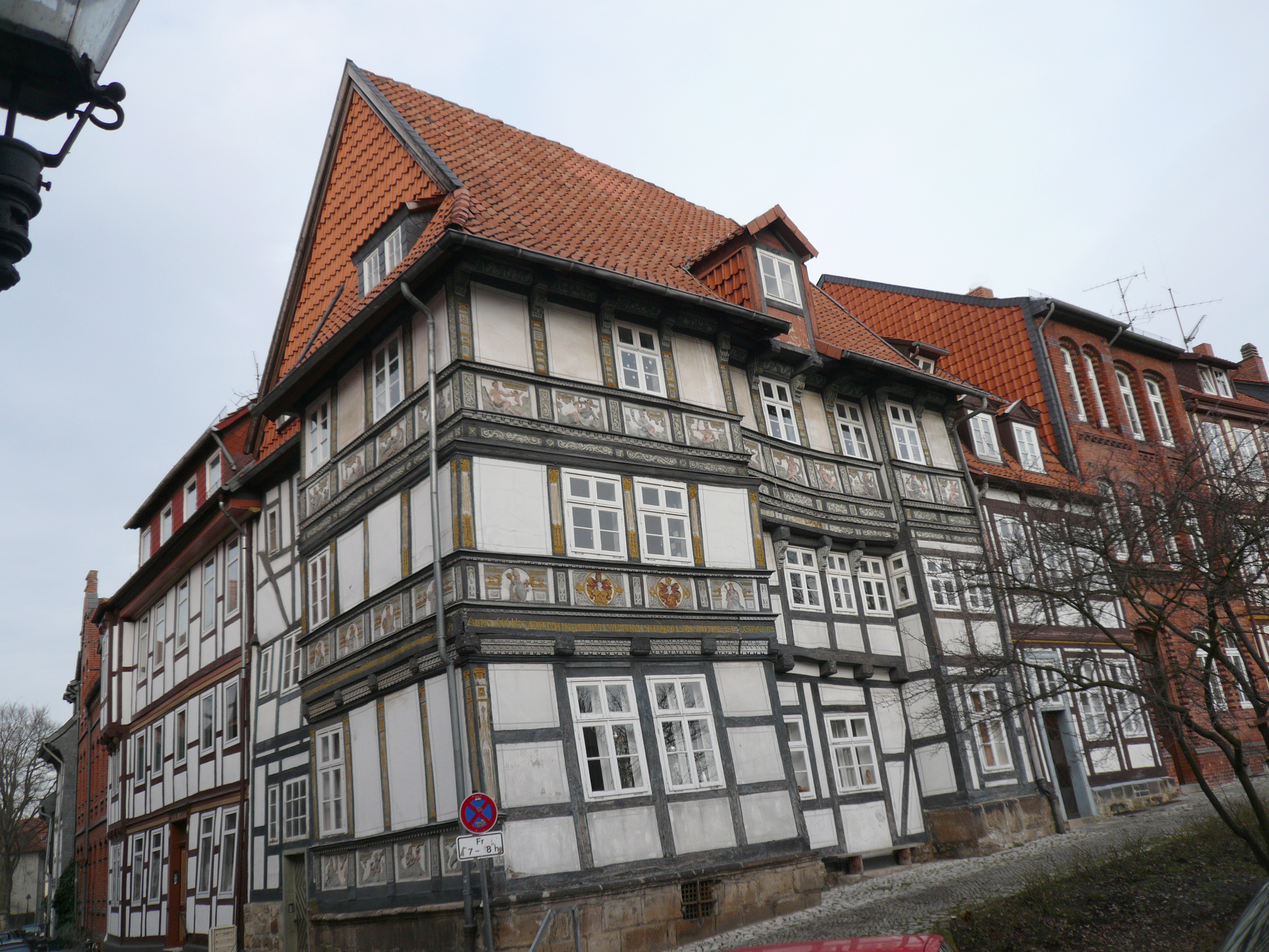 Traditional house in Hildesheim (Wernersches Haus)